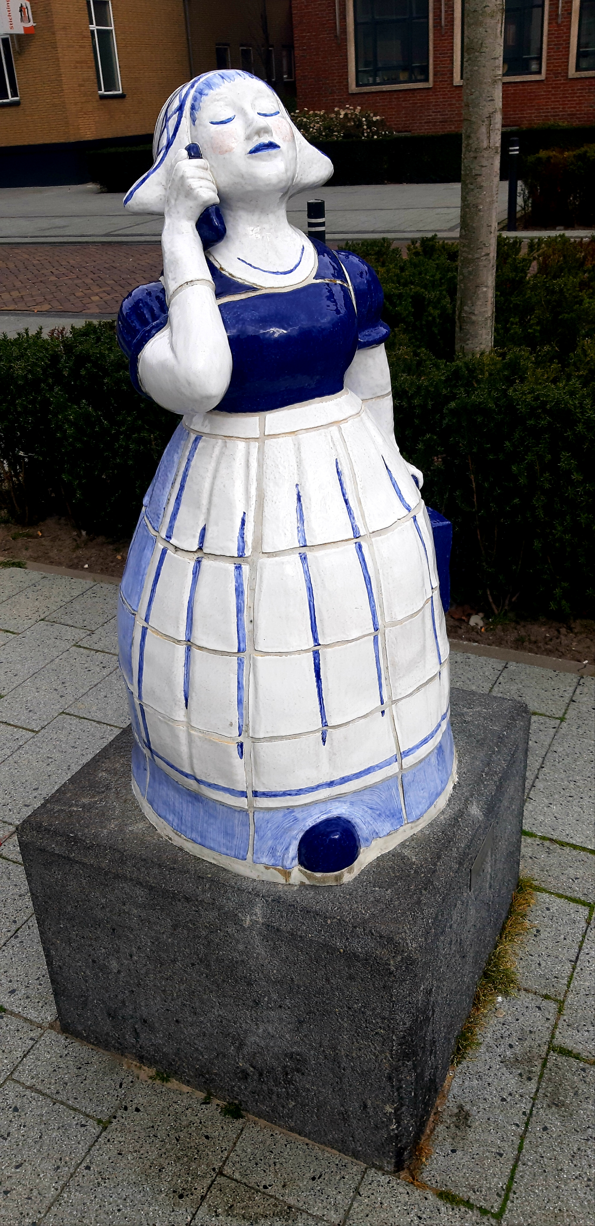 Kunstwerk van Guusje Beverdam met de naam Wiefie (2012). Dit beeld staat in Hengelo (Overijssel)